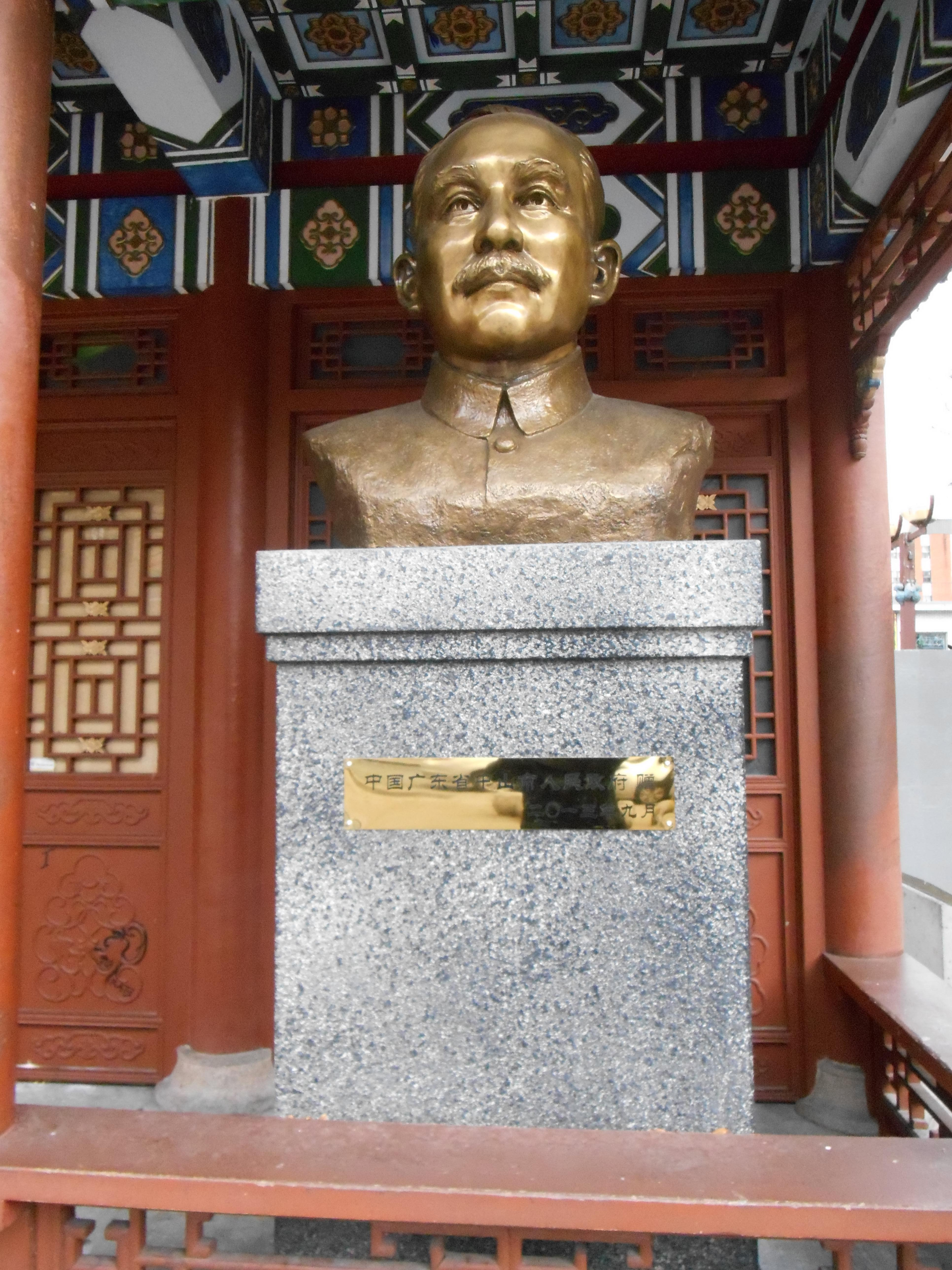 Buste de Sun Yat-sen, place Sun Yat-Sen, à l'intersection des rues De La Gauchetière et Clark, quartier chinois de Montréal